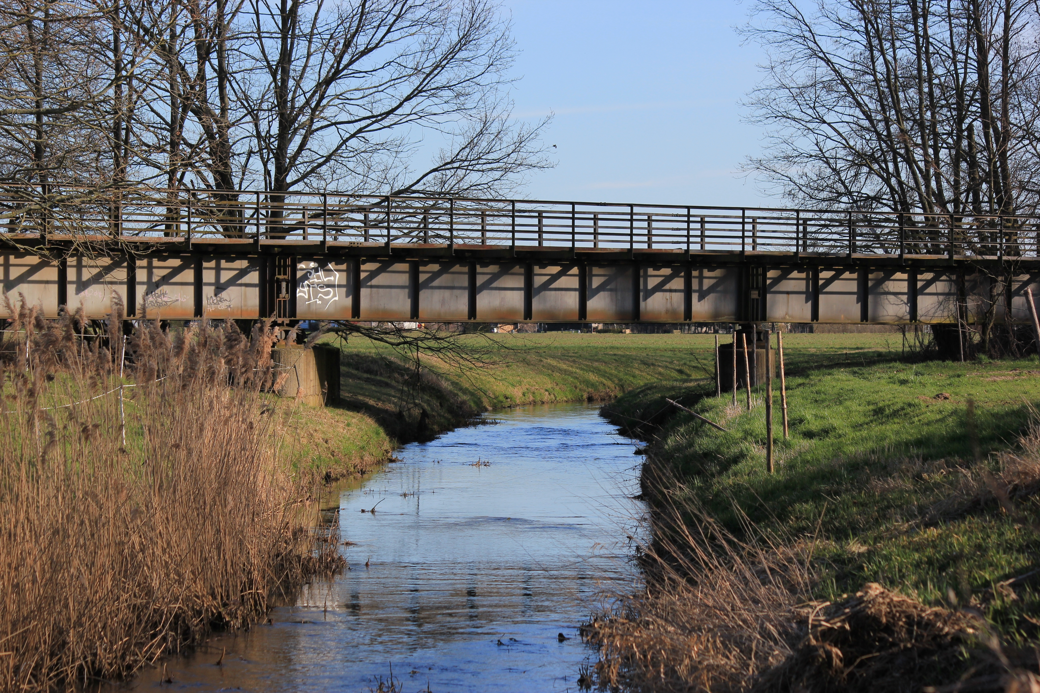 Hornjoserbsce: Železniski móst přez Čornicu sewjernje Rakec